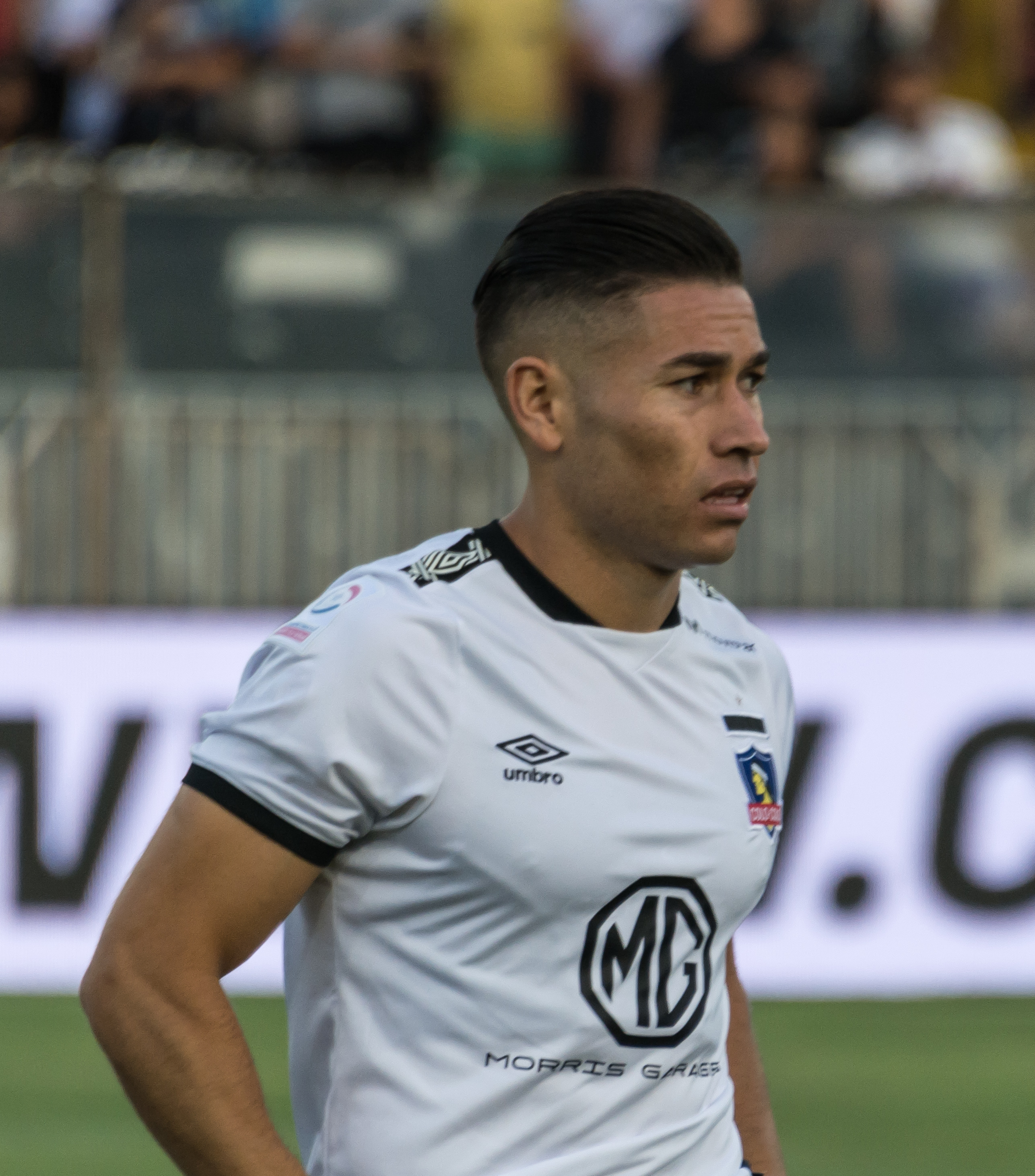 Colo-Colo v Palestino, Estadio Monumental, Macul, Santiago, Región Metropolitana, Chile